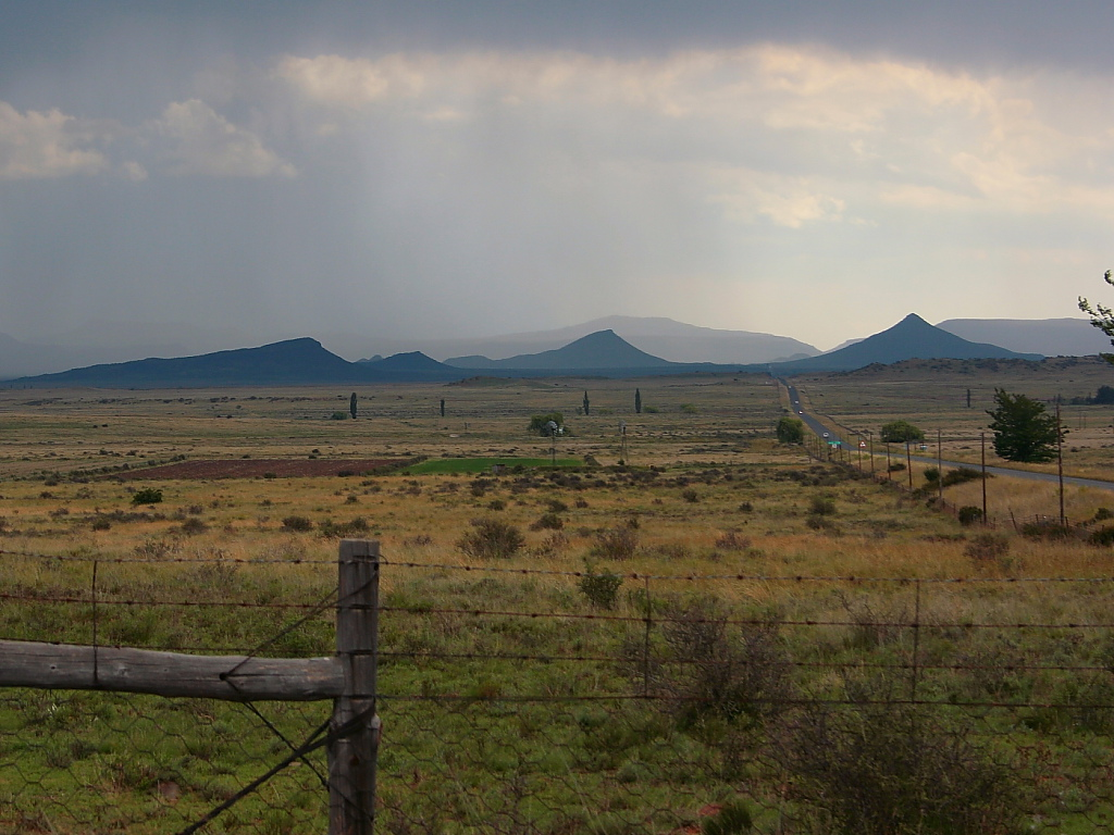 Erinmore